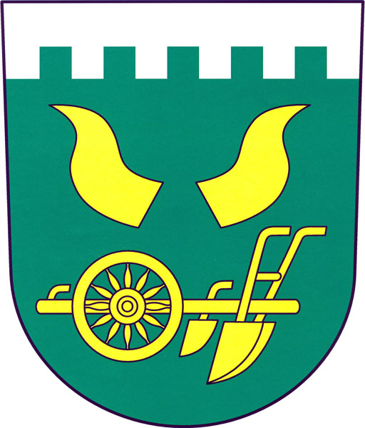 Znak obce Hluboké Dvory